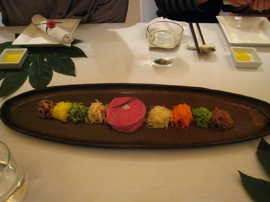 Gujeolpan, a Korean dish